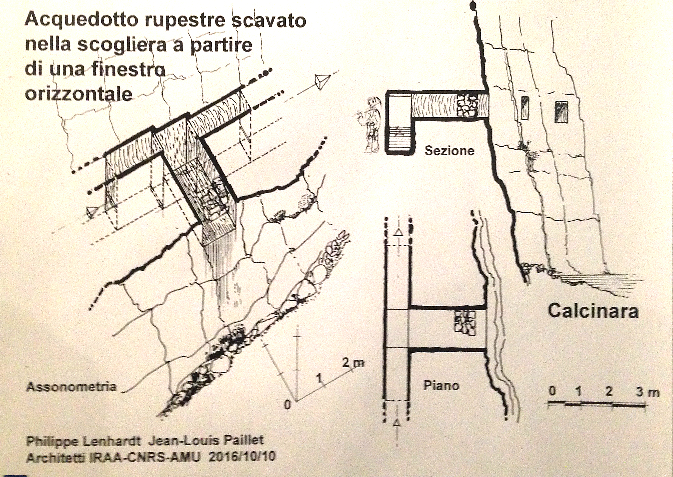 Schema di escavazione dell'acquedotto Galermi